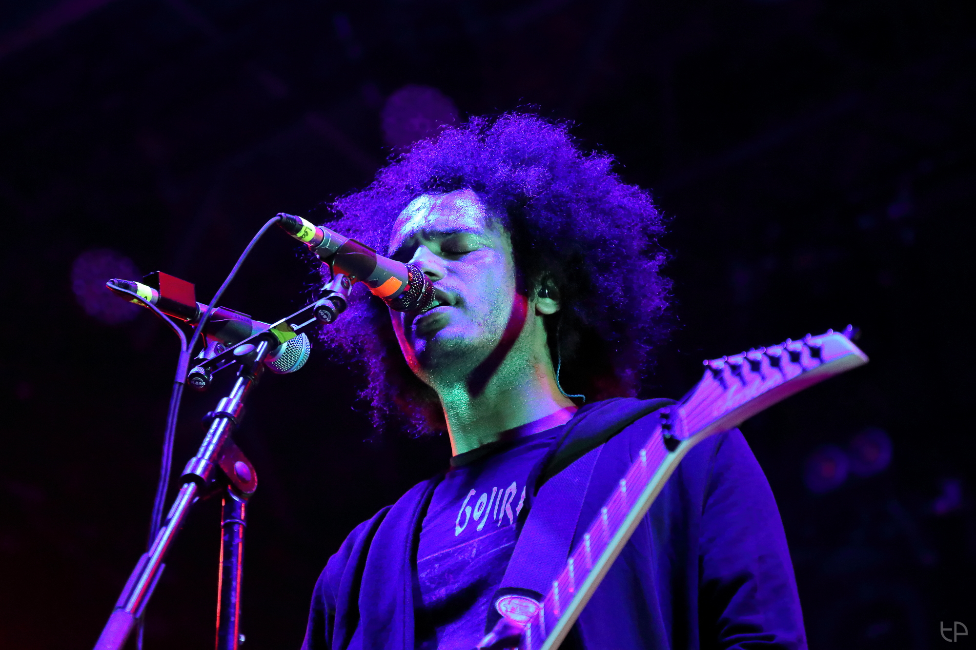 4L8A3177_web